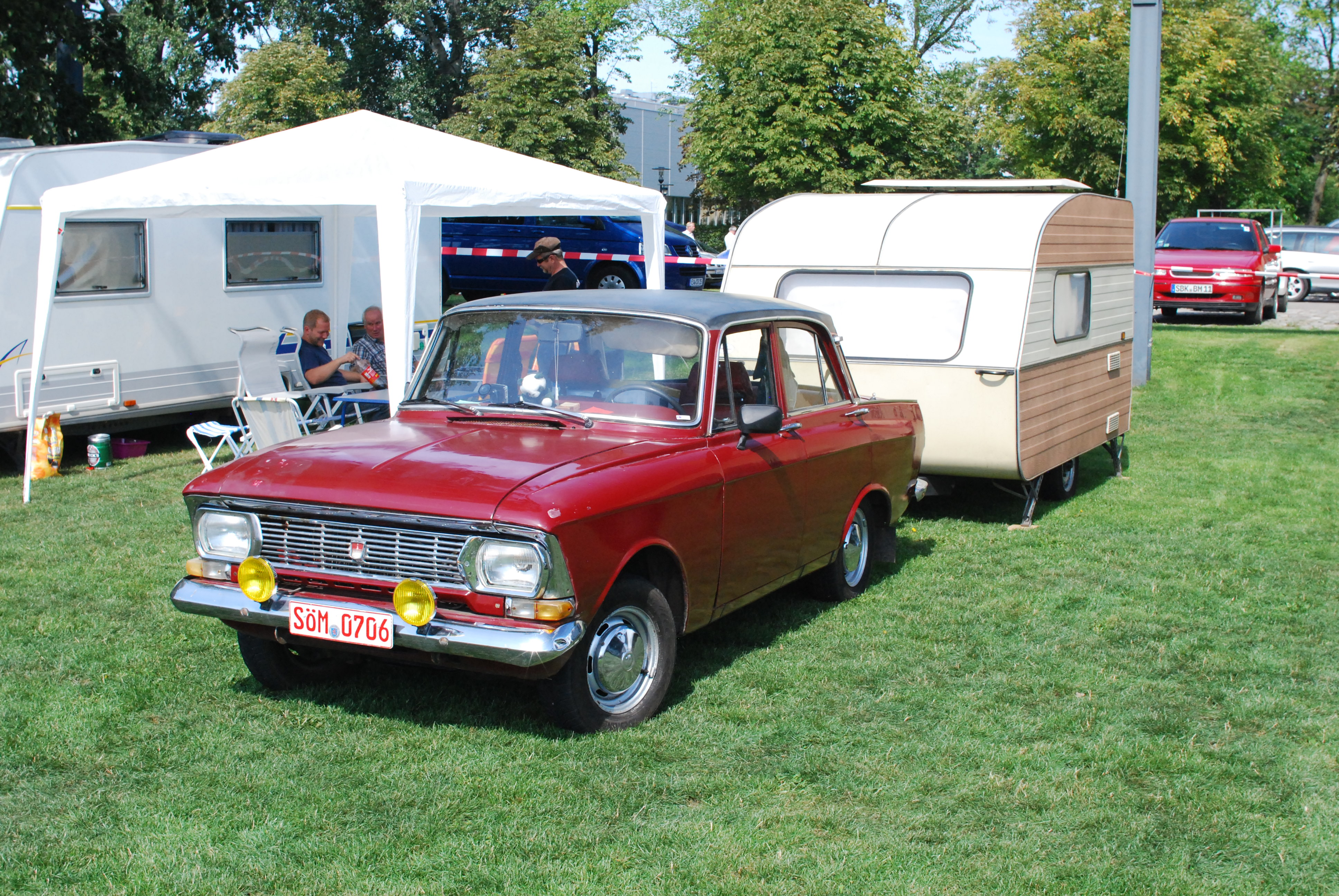 Moskwitsch 408 mit Wohnwagen QEK 325 auf der OMMMA 2011 im Magdeburger Elbauenpark